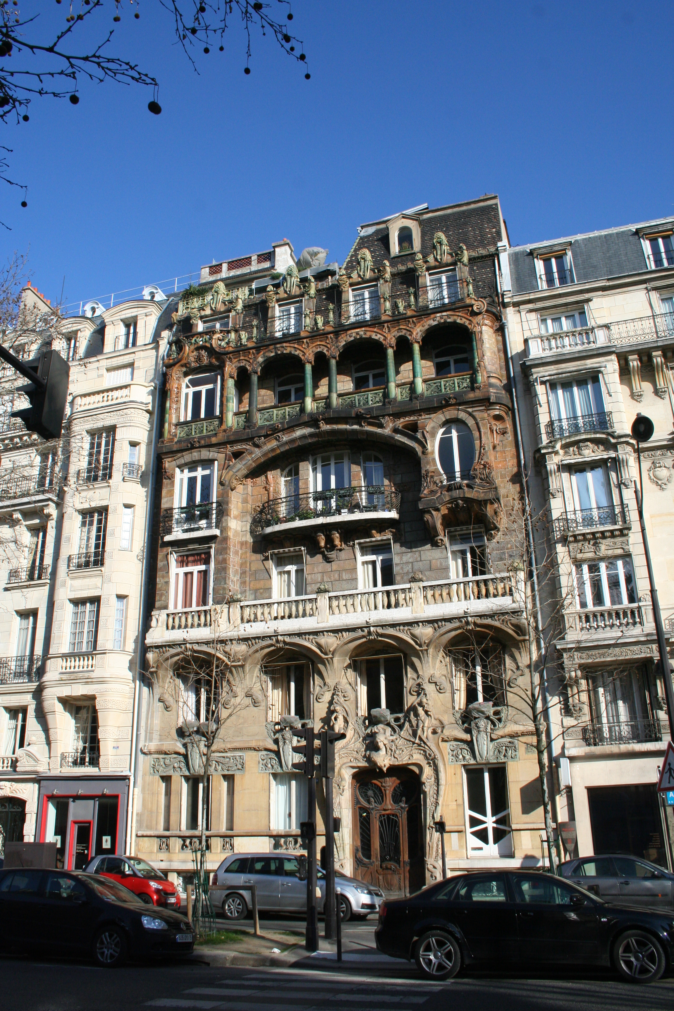 Facade